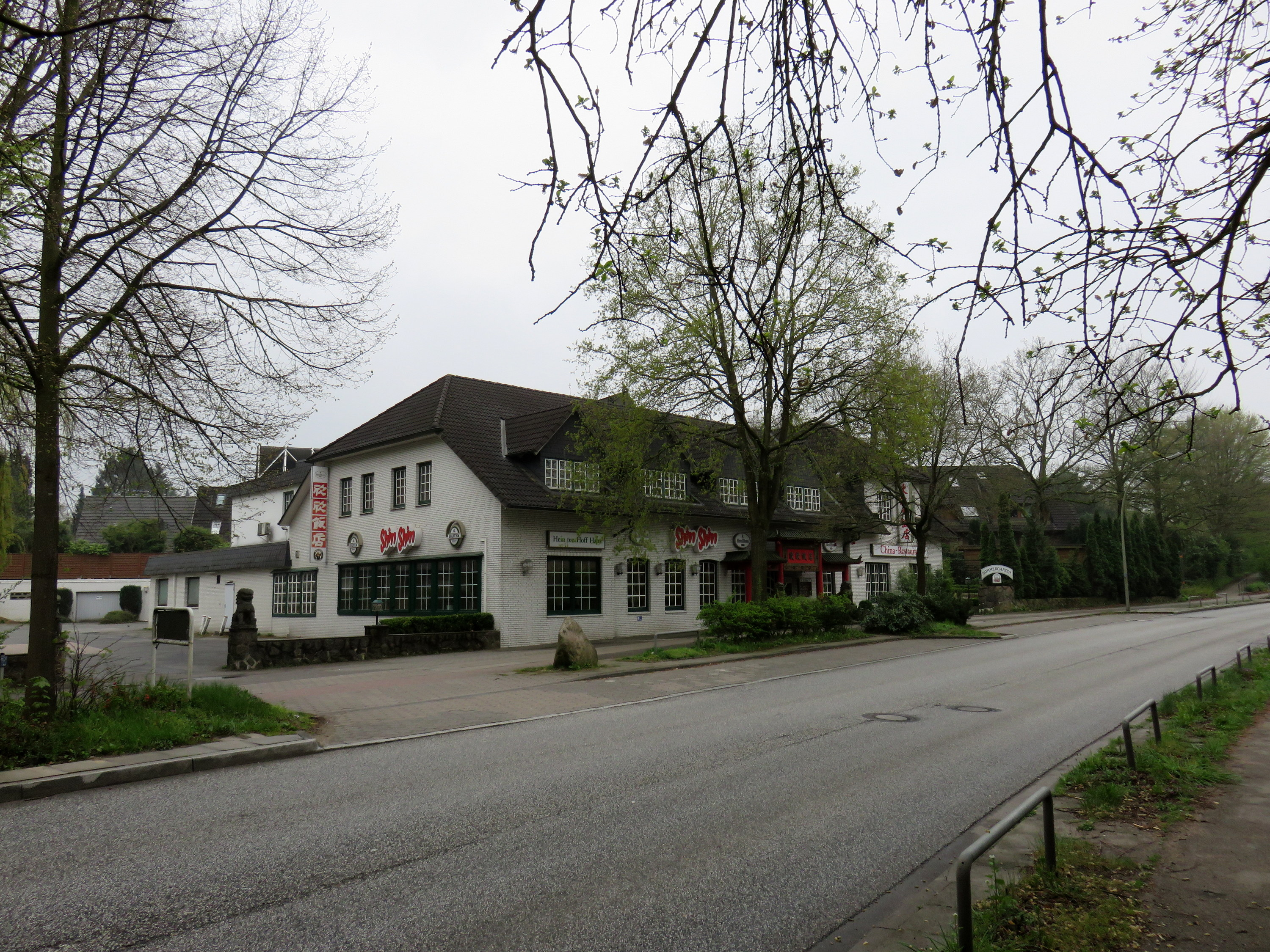 Hein ten Hoff Haus, Saseler Chaussee 254 in Hamburg-Sasel, ehemaliges Wohnhaus des deutschen Boxers Hein ten Hoff (1919-2003), beliebtes China-Restaurant.